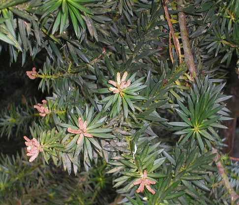 Flores masculinas del mañío de hojas punzantes Podocarpus nubigenus Mapudungun: Mañiw ñi wentrupeskiñ